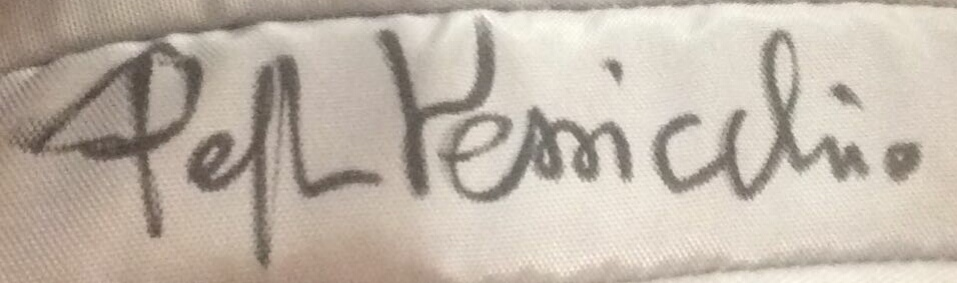 Firma del direttore d'orchestra Peppe Vessicchio